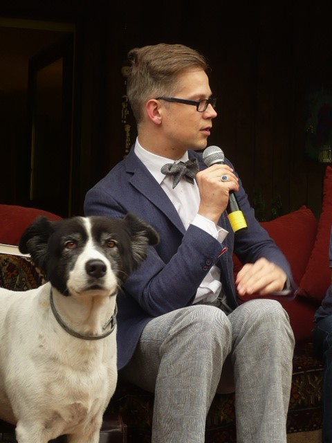 Jacek Dehnel na Festiwalu Góry Literatury w Krajanowie